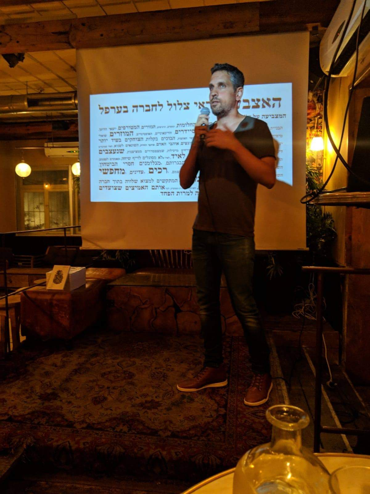 שי עמית מרצה